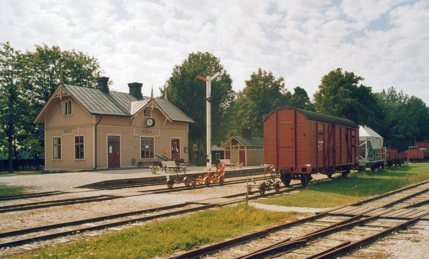 Hesselby station, Gotlands Hesselby Jernväg, i Dalhem på Gotland.